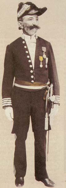 Jean Marie Marcelin Gilibert (1839-1923), militaire français, créateur et premier directeur de la police nationale colombienne